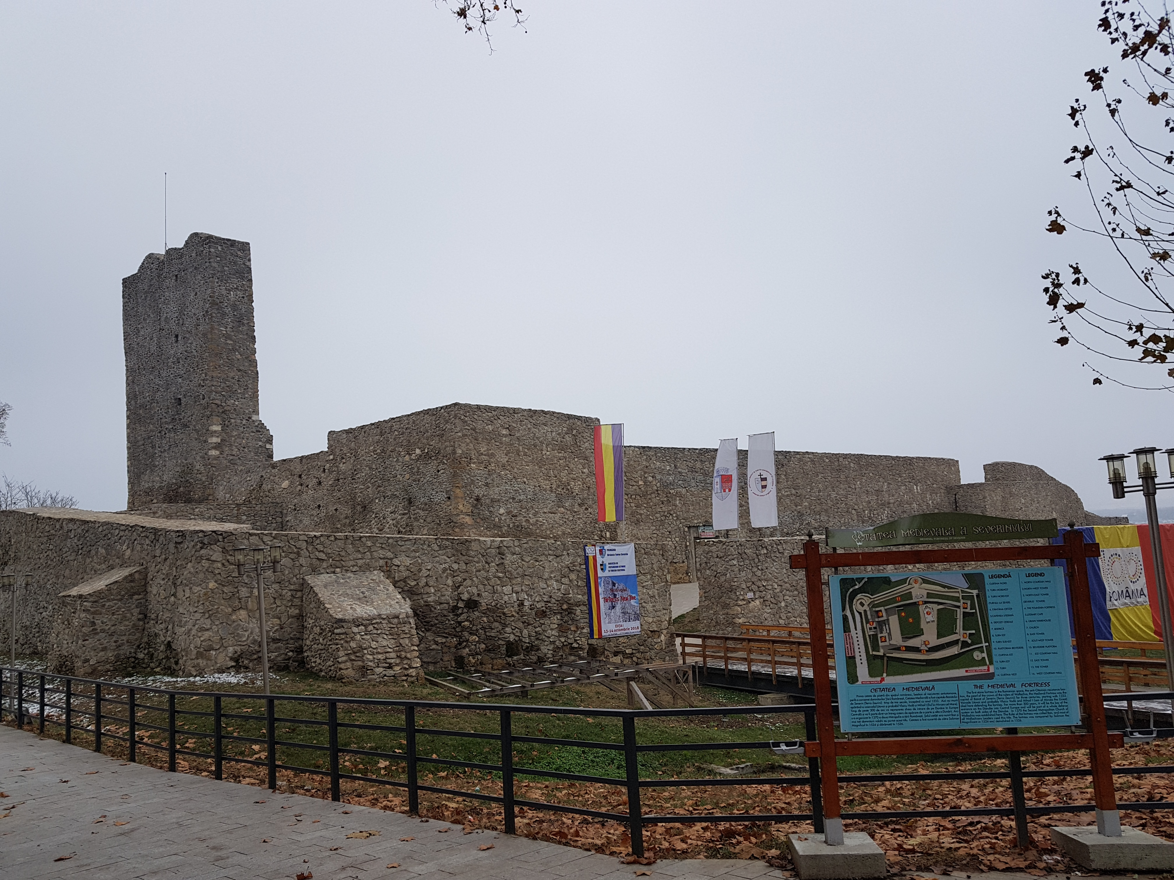 Ruinele Cetății Severinului